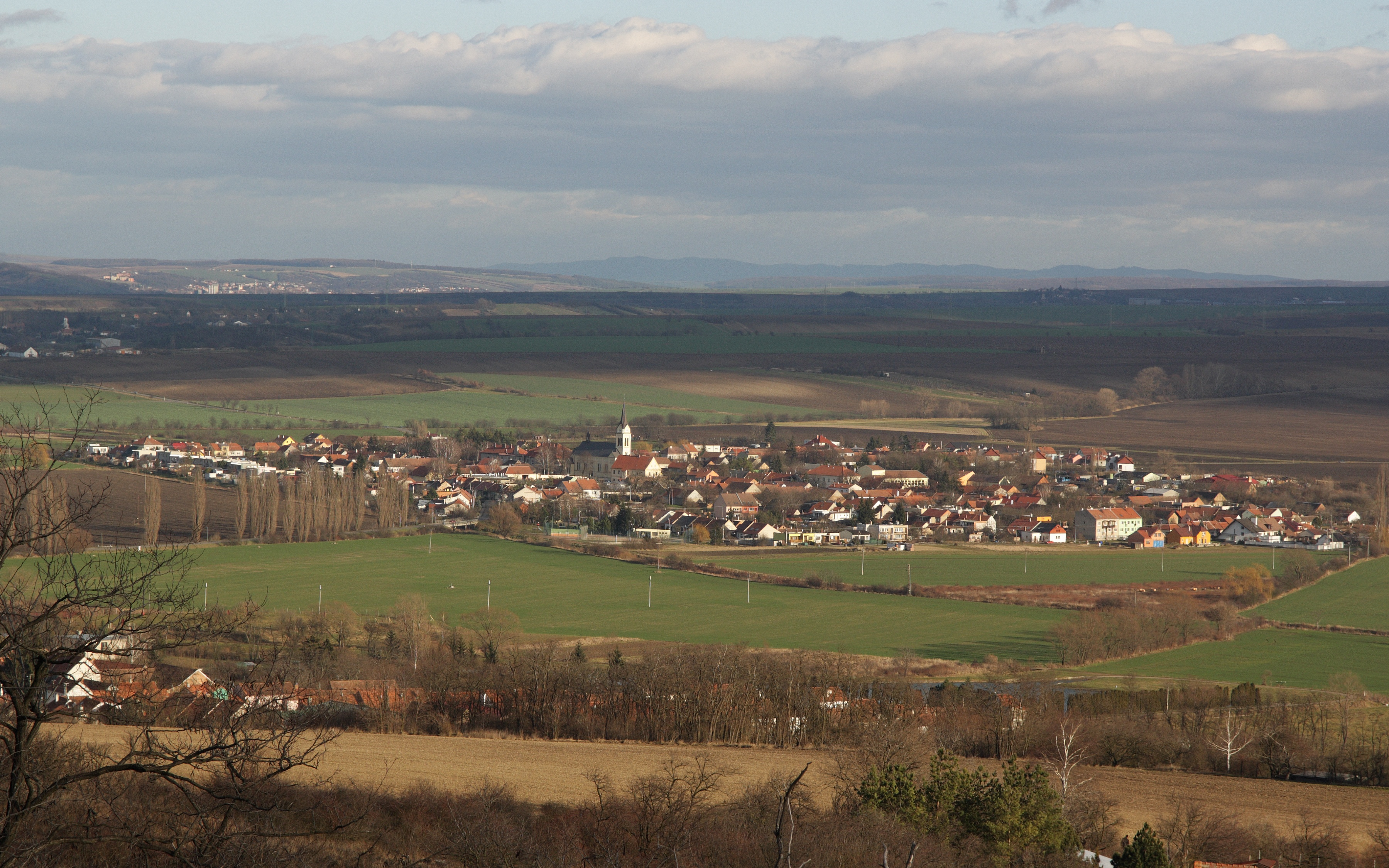 Šaratice - pohled ze Staré hory